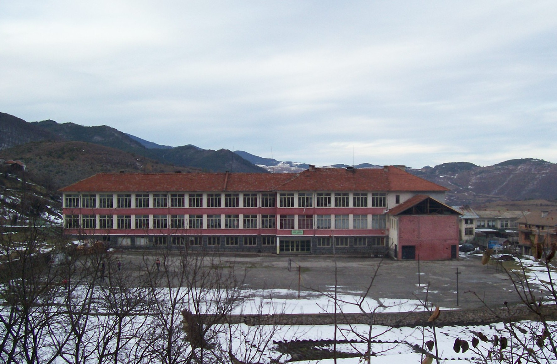 Селча - ОУ "Отец Паисий"